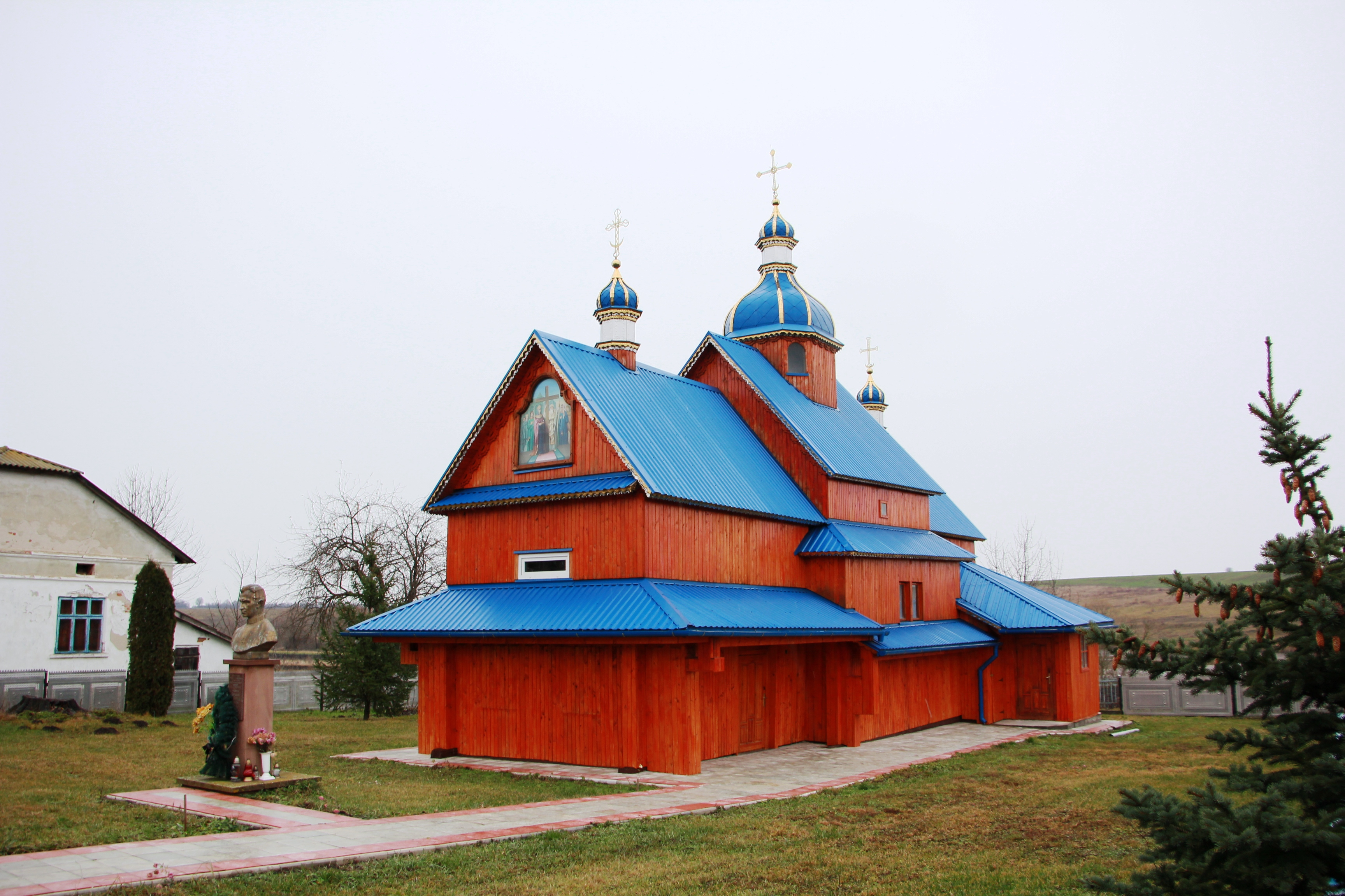 Церква Воздвиження Чесного Хреста 1734